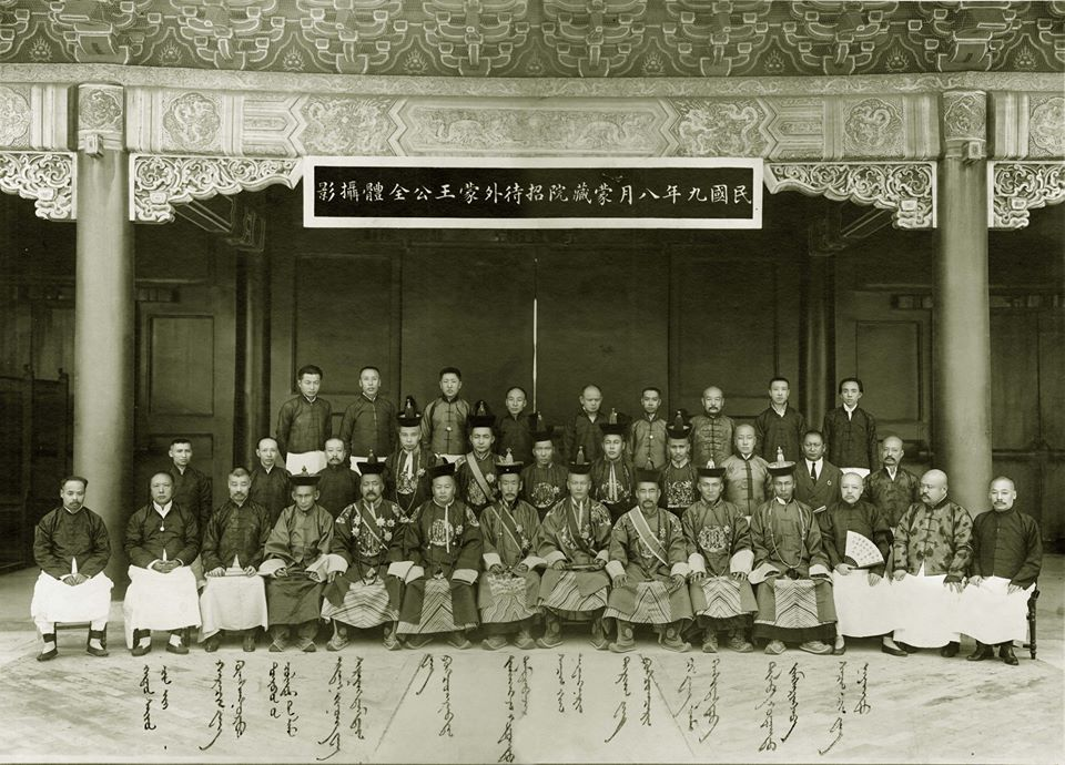 Монгол: Ард нь "Дундад улс байгуулагдсаны 9-р он 8-р сар Монгол Түвдийн хорооны урилгаар айлчилсан Гадаад Монголын Ван,гүн нийт зочдын хөрөг зураг" (Монгол ноёд Бээжинд 1920 он ) Монгол бичгээр 1. Хятад сайд Чен И 2. Харчин ван Гүнсэнноров 3. Дөрвөдийн Чүлтэм Да Лам. 4. Эрдэнэ Жонон Ван Ширнэндамдин 5.Ван Пунцагравдан 6.Жалханз хутагт Дамдинбазар. 7. Сэцэн хан Навааннэрэн 8.Дархан ван Пунцагцэрэн 9. Чин ван лам Дашдэндэв 10. Дилав Хутагт Жамсранжав 11. Сэцэн чин ван Наянт